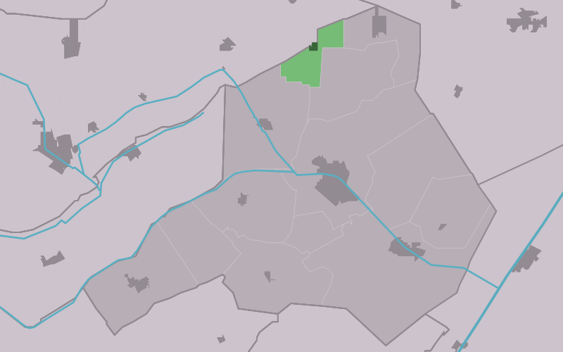 Kaartsje fan himrik fan Waskemar